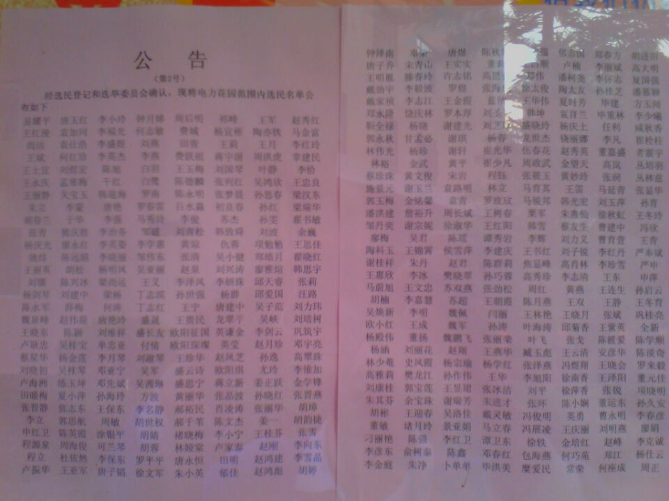 中华人民共和国广东省深圳市一个居民小区内张贴的选民名单，原本共有3张，图中仅包含前两张内容。名单标题为“公告”，下写“（第2号）”，之后是黑体字“经选民登记和选举委员会确认，现将电力花园范围内选民名单公布如下：”，再之后即为名单。